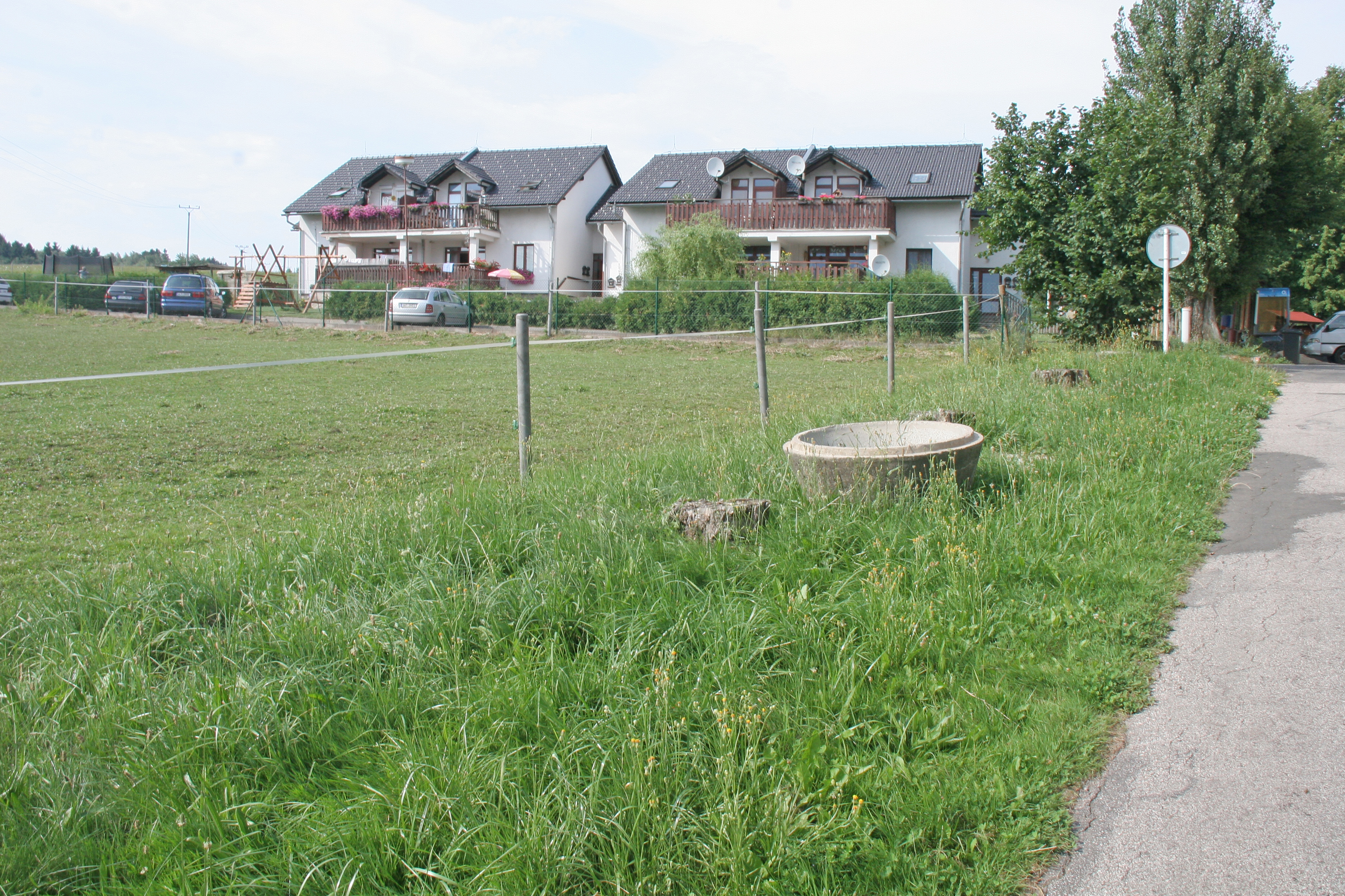 Úhlejov čp. 62